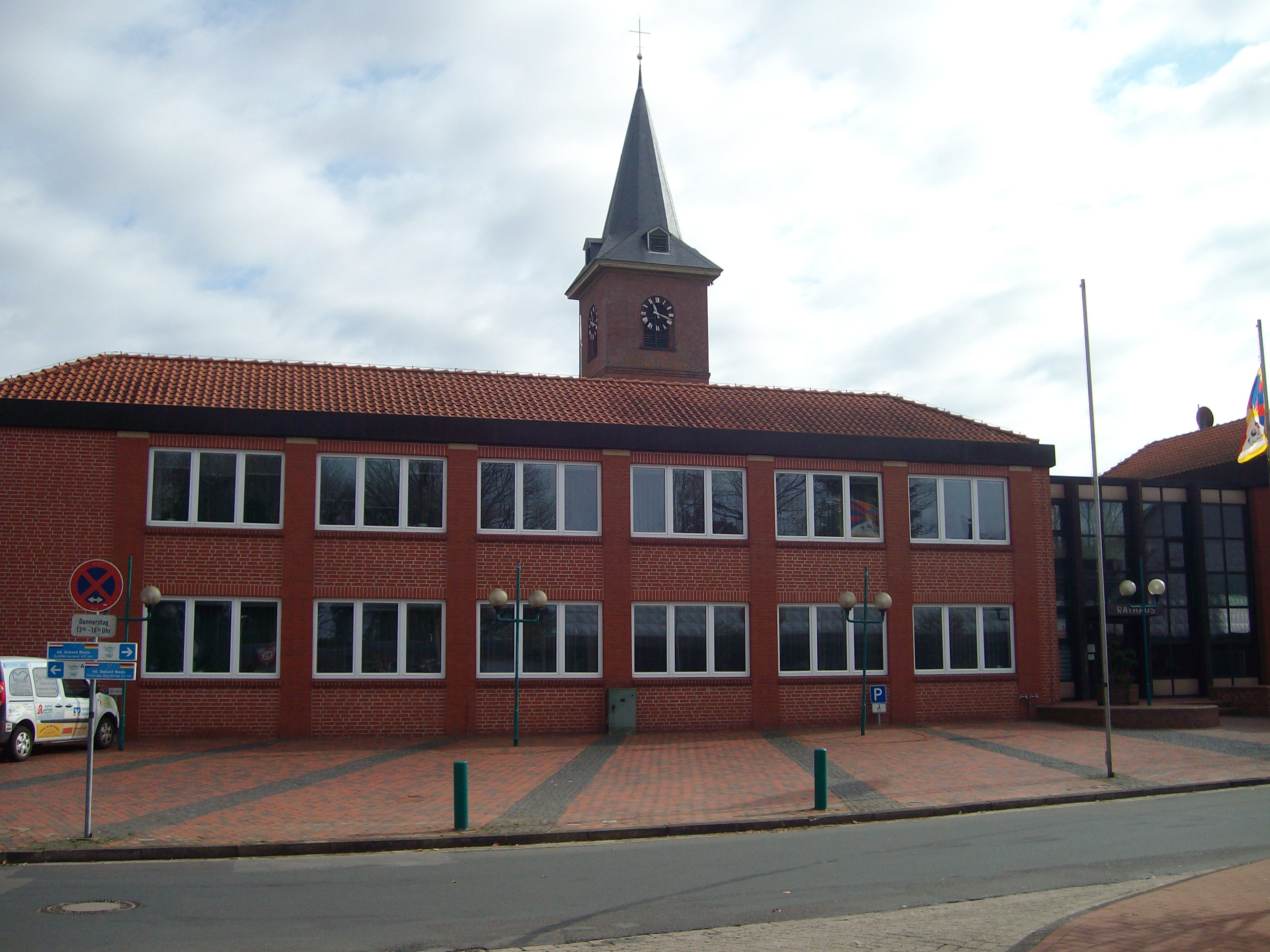 Rathaus in Bunde, Ostfriesland